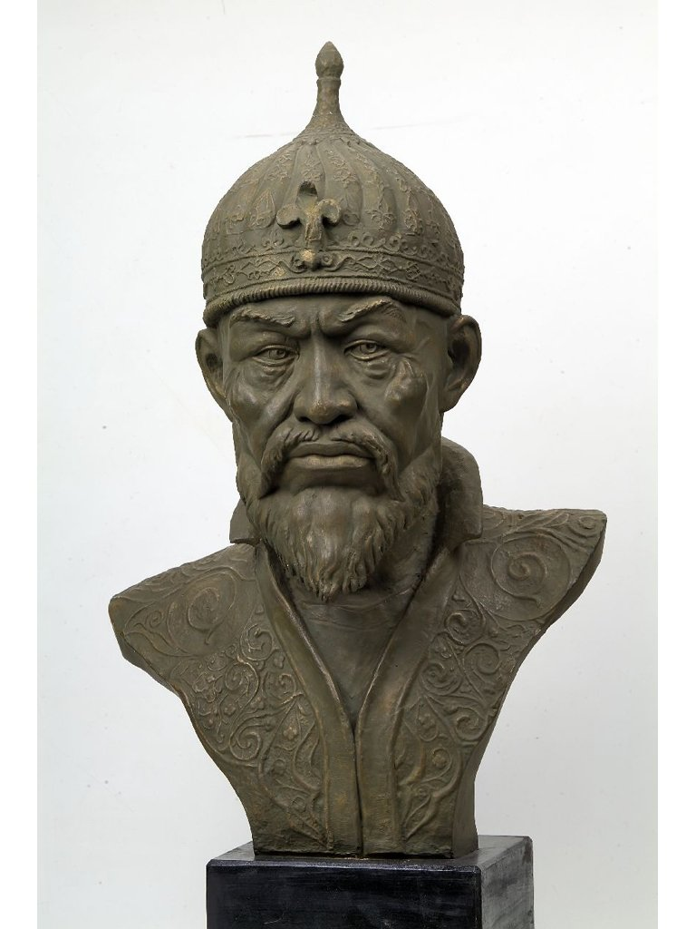 Институт этнографии Академии наук СССР. Лаборатория пластической антропологической реконструкции. Скульптурный портрет Тамерлана - реконструкция антрополога Михаила Герасимова.